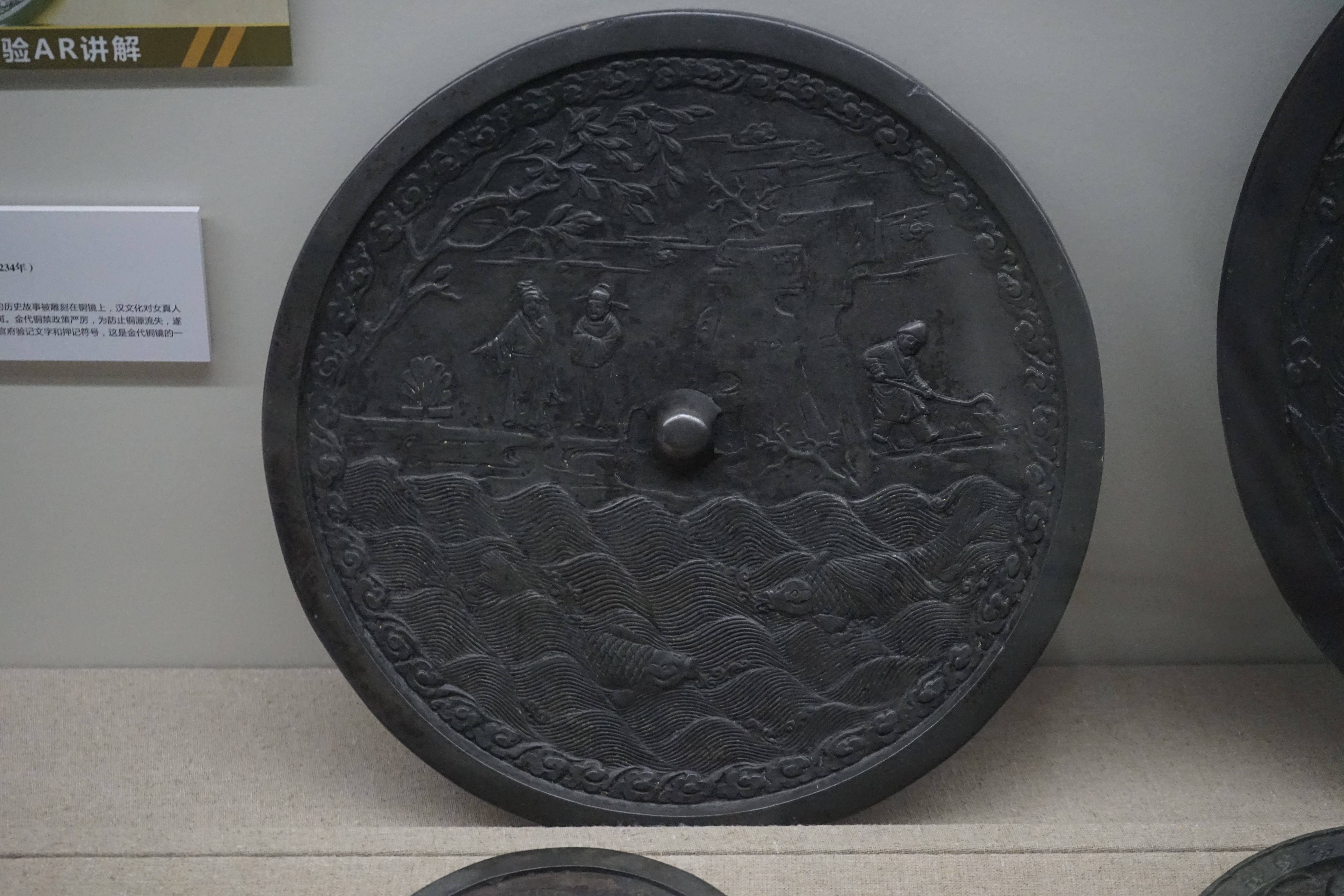 人物故事镜 金 绥棱县征集